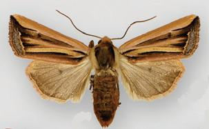 Hypotrix ferricola female